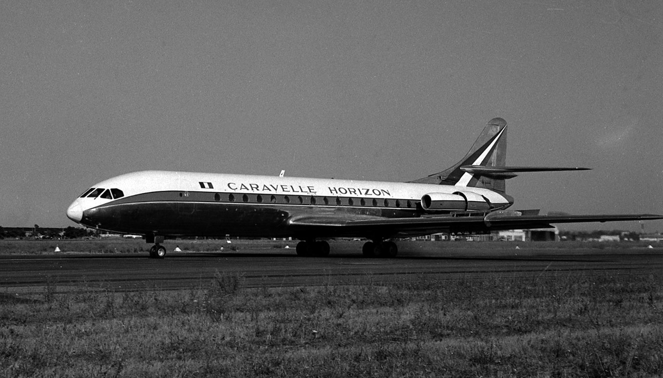 Pistes de Blagnac. 28 août 1962. Première sortie de la Caravelle Horizon (version américaine de l'avion) sur la piste : vue d'ensemble de l'avion (vue de côté). Observation: La Caravelle Horizon est la version américaine de Caravelle, équipée de moteurs américains Général Electric (contrat signé entre Sud-Aviation et Douglas chargé de sa commercialisation au USA). Finalement, Douglas gèle le projet, jouant le temps, pour en final annoncer la sortie de son propre avion biréacteur, le Douglas DC 9. Les options américaines sont annulées, les Compagnies US commandent le DC 9 et le Boeing 727.